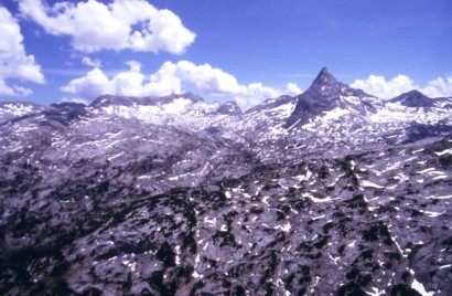 Die Hochfläche des Steinernen Meeres im Juni, hinten rechts die Schönfeldspitze. Standpunkt des Fotografen: Gipfel des Viehkogel, 2158 m.